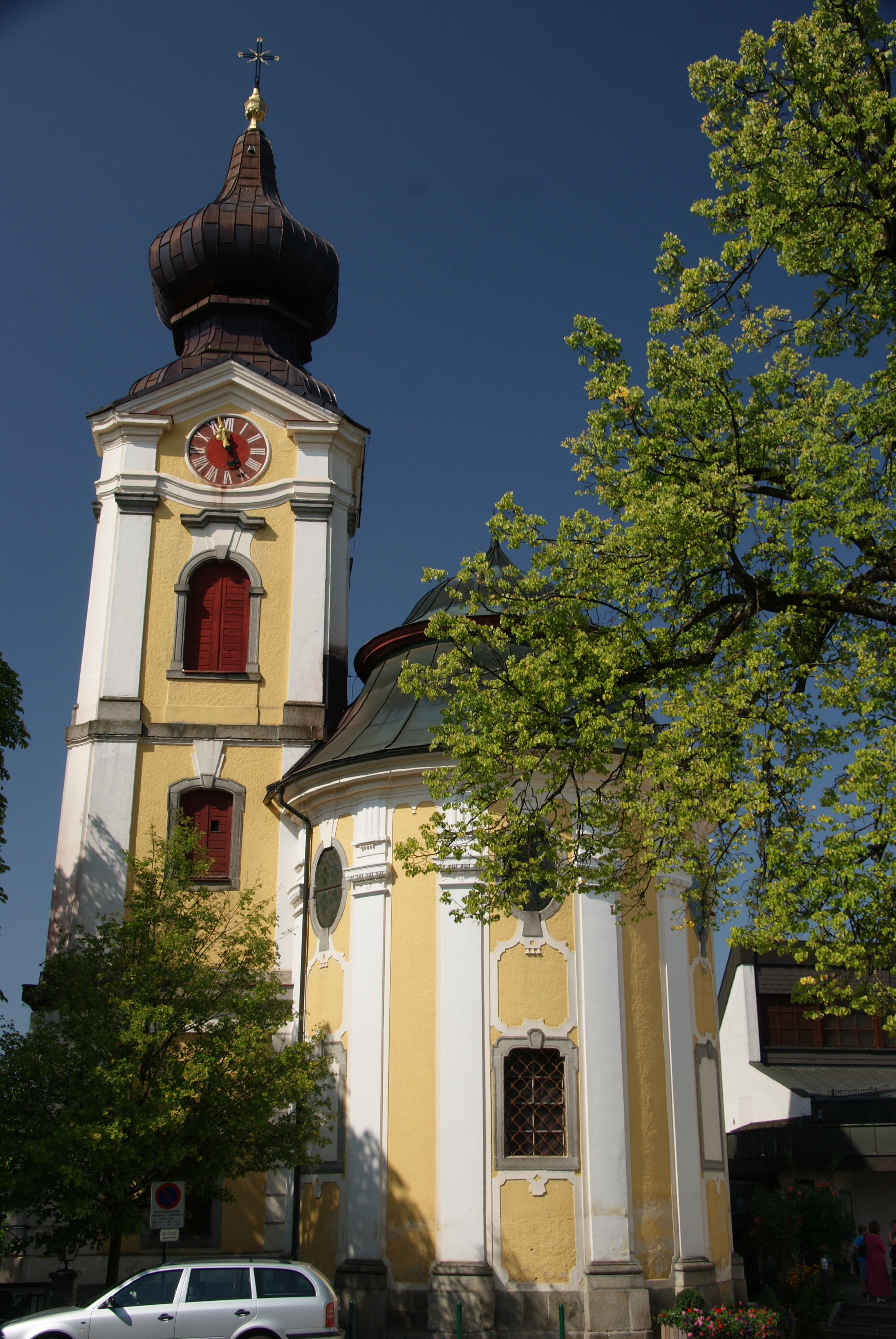 Schlosskapelle, Hagenberg im Mühlkreis, Oberösterreich